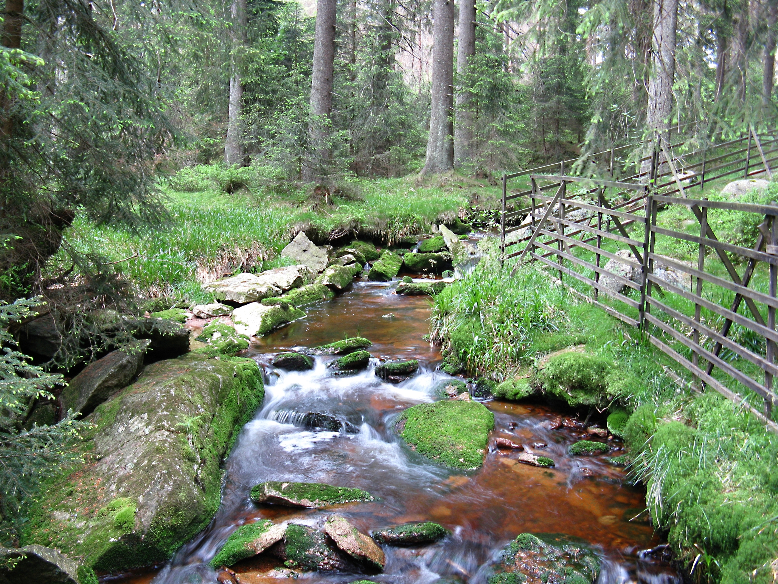 Die Oder oberhalb des Oderteiches